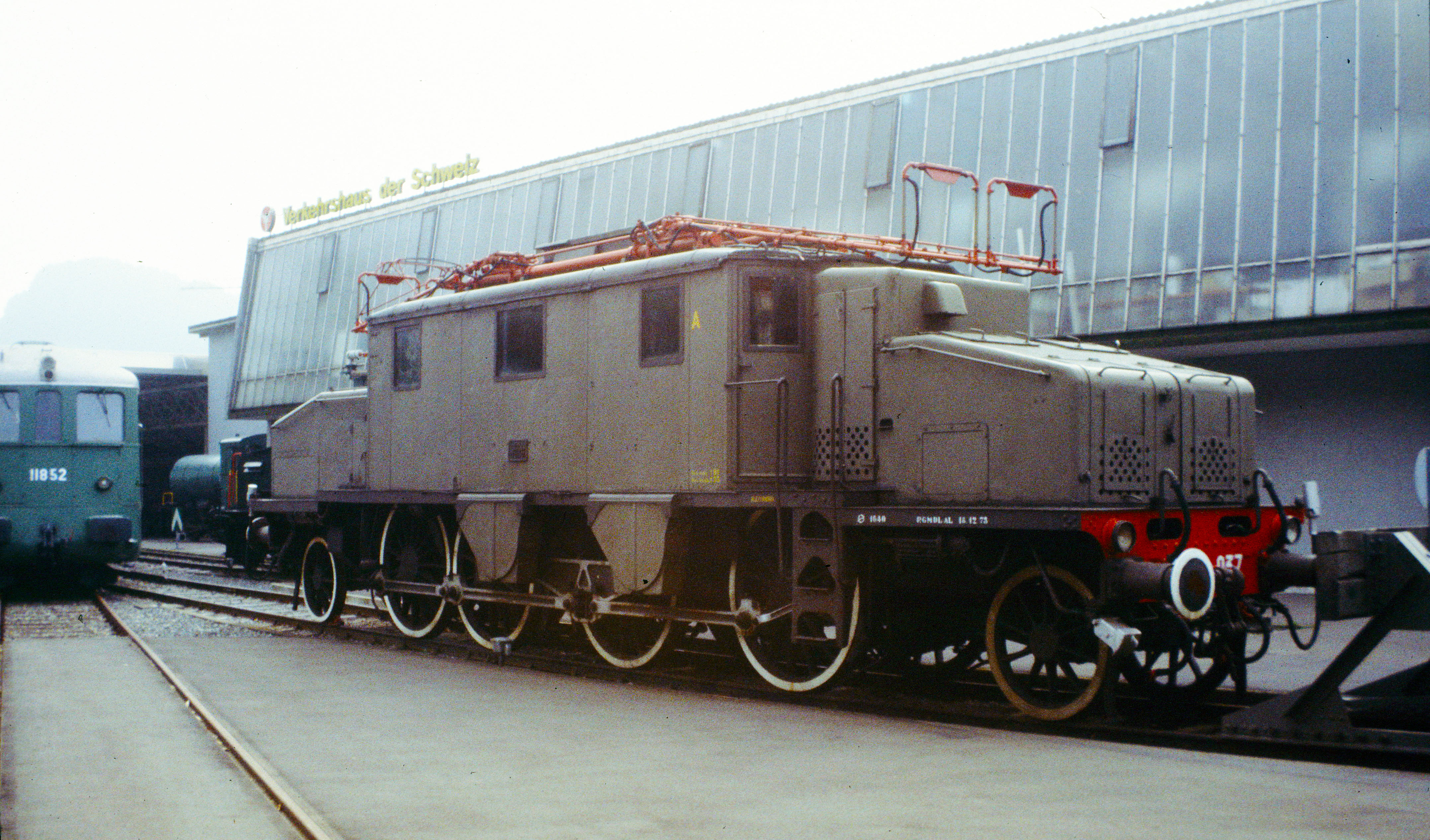 Locomotiva trifase FS E.431 037 al museo dei trasporti svizzero di Lucerna nel 1995